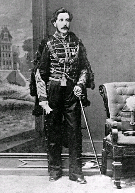 Ramón Allende Padín, el "Rojo" (nació en Valparaíso, el 19 de marzo de 1845 y falleció en Santiago, el 14 de octubre de 1884), fue un político y médico cirujano chileno.